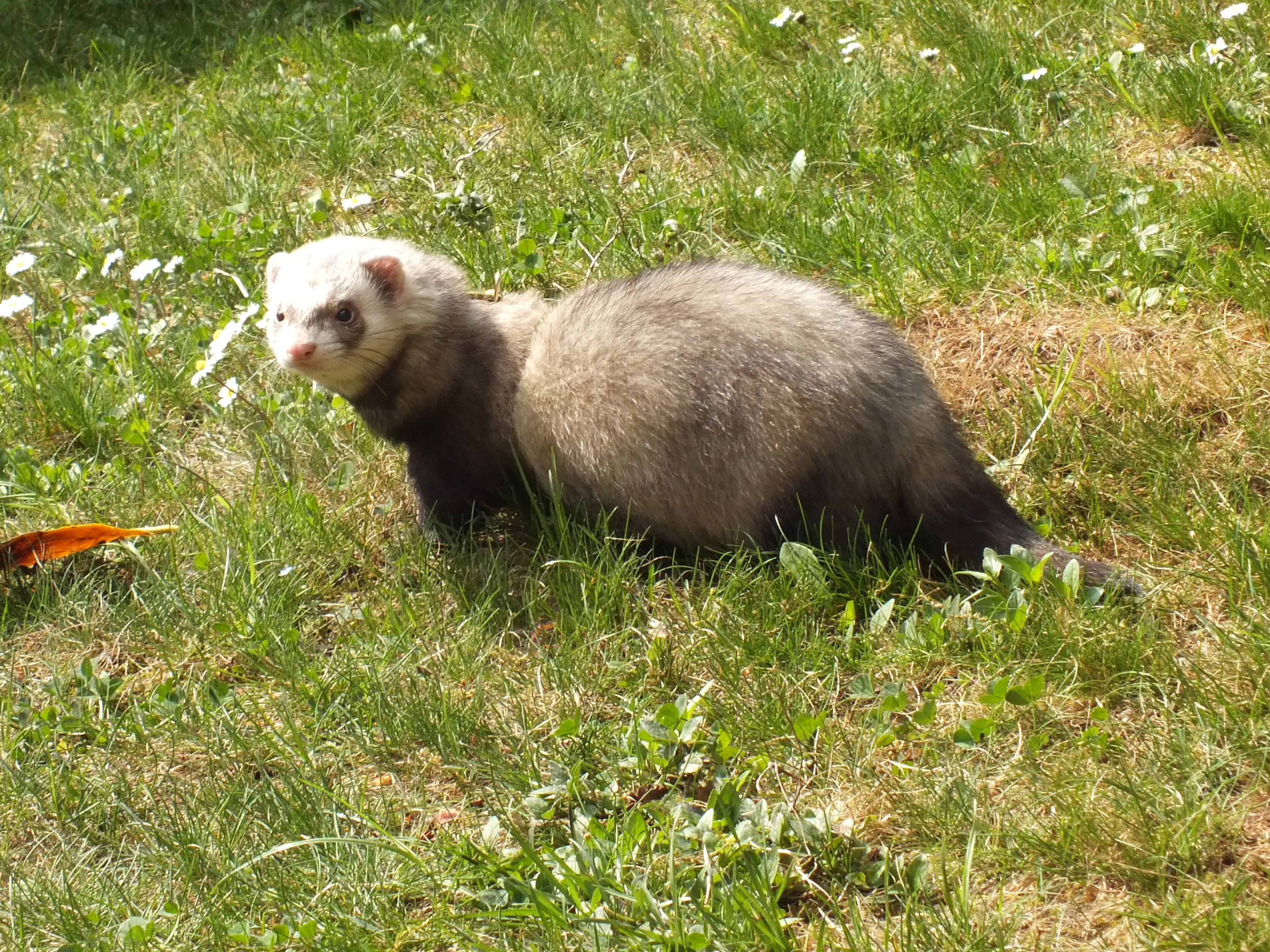 Jake, esemplare di mascherina